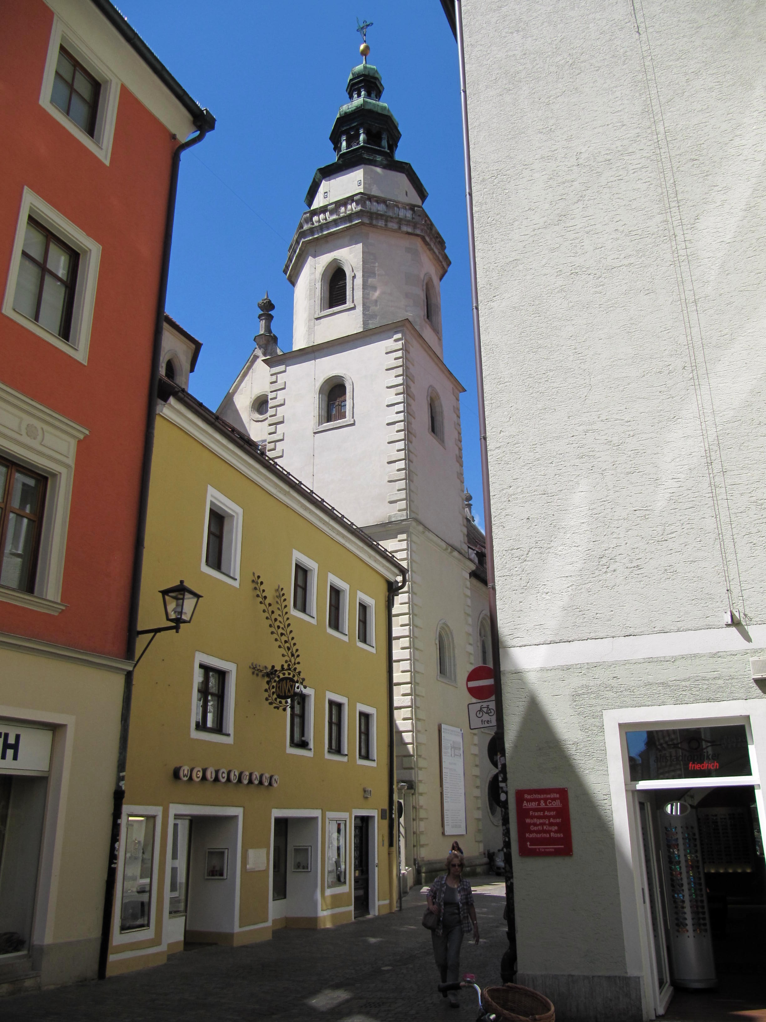 Dreieinigkeitskirche Regensburg Ostseite